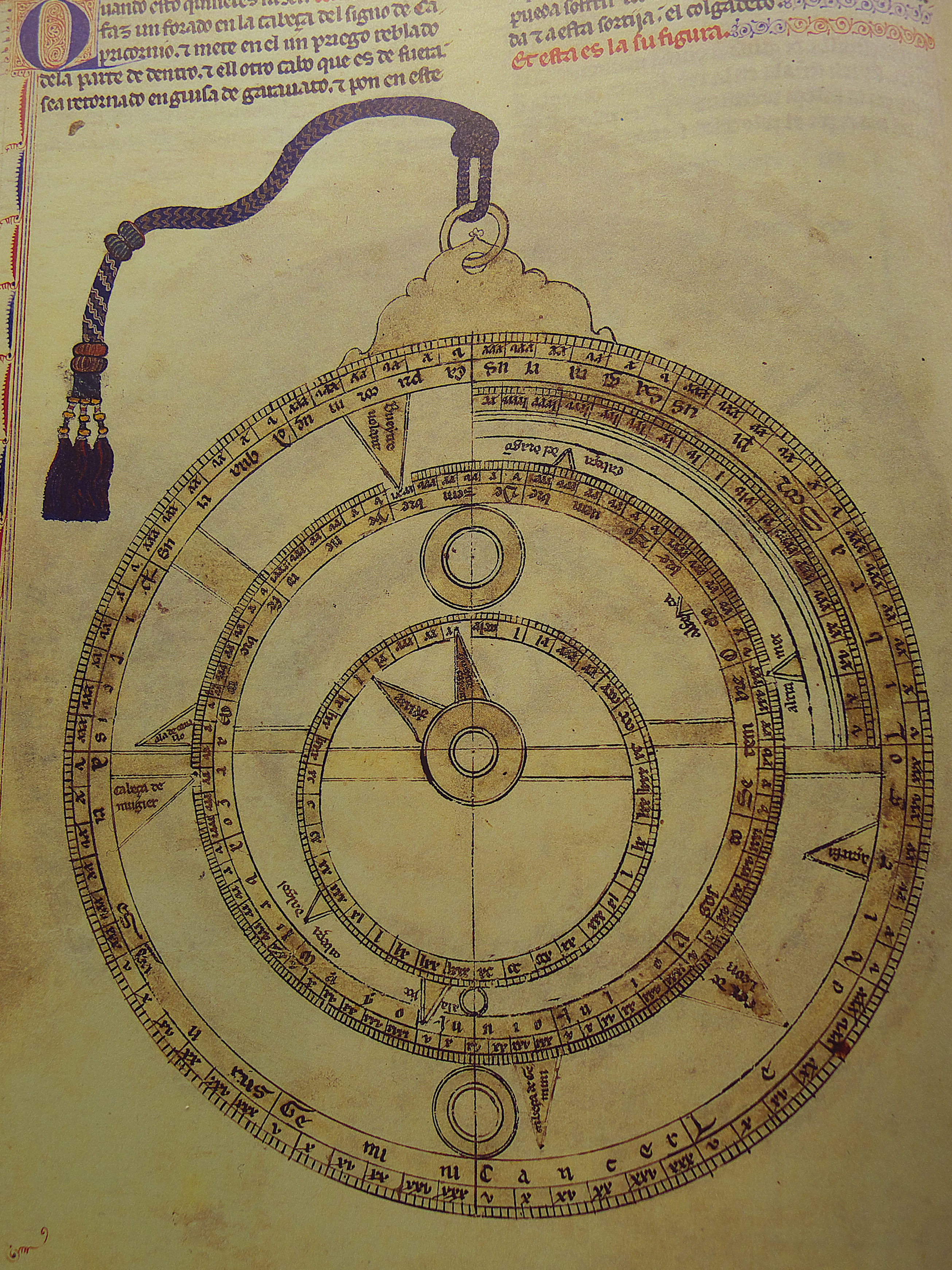 ... POR SU AMPLIO CONOCIMIENTO SOBRE TODO DE LA ASTRONOMÍA Y POR SU PERICIA EN LAS LEYES DECRETADAS DEL DERECHO HISPANO, HA MERECIDO CON JUSTICIA EL SOBRENOMBRE DE SABIO ... (Capilla Real de la Catedral de Sevilla), epitafio.Libros del saber de astronomía. Universidad Complutense de Madrid. Libro primero del astrolabio redondo, Alfonso X de Castilla (1277)